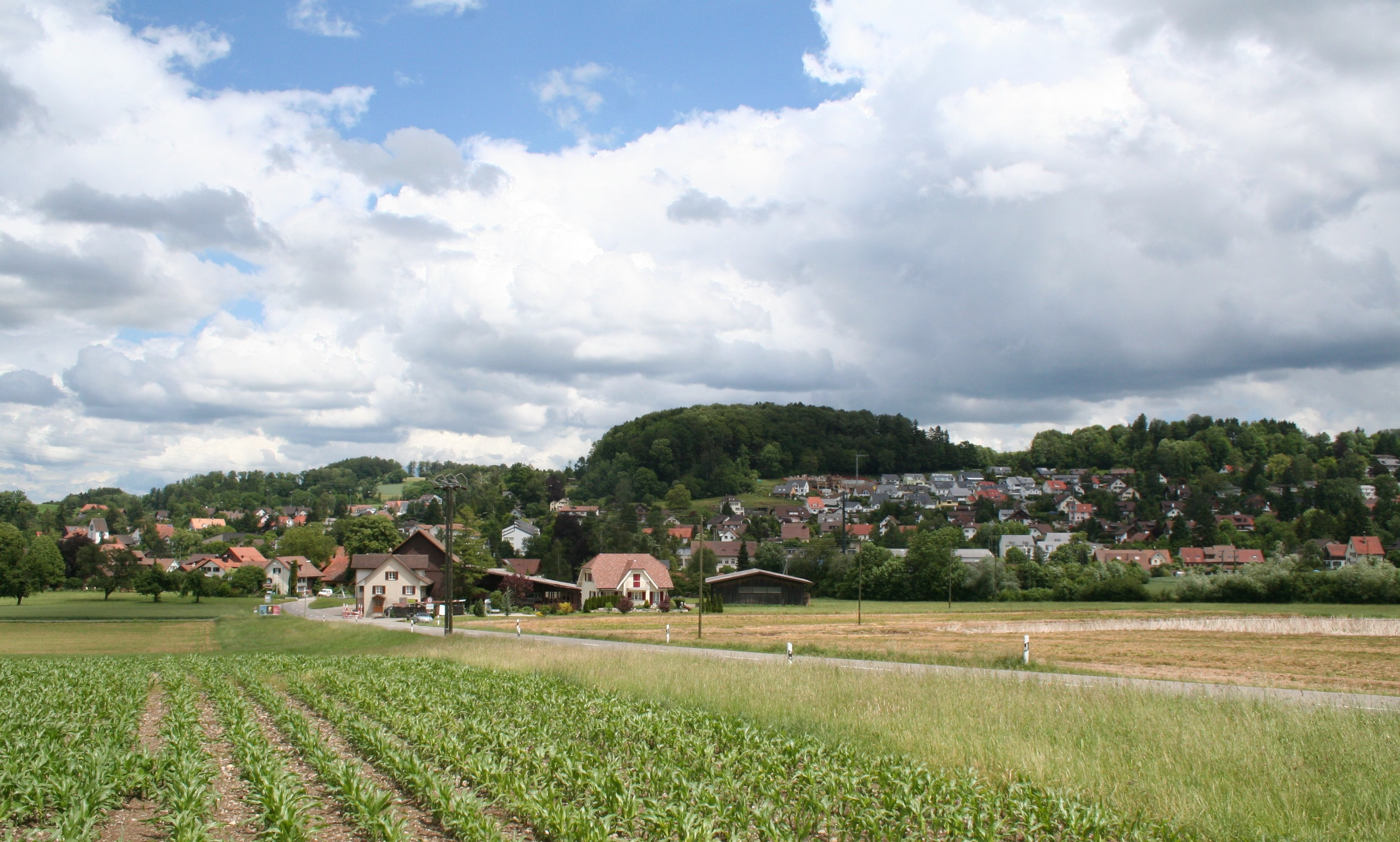 Weisslingen, Ansicht von Westen